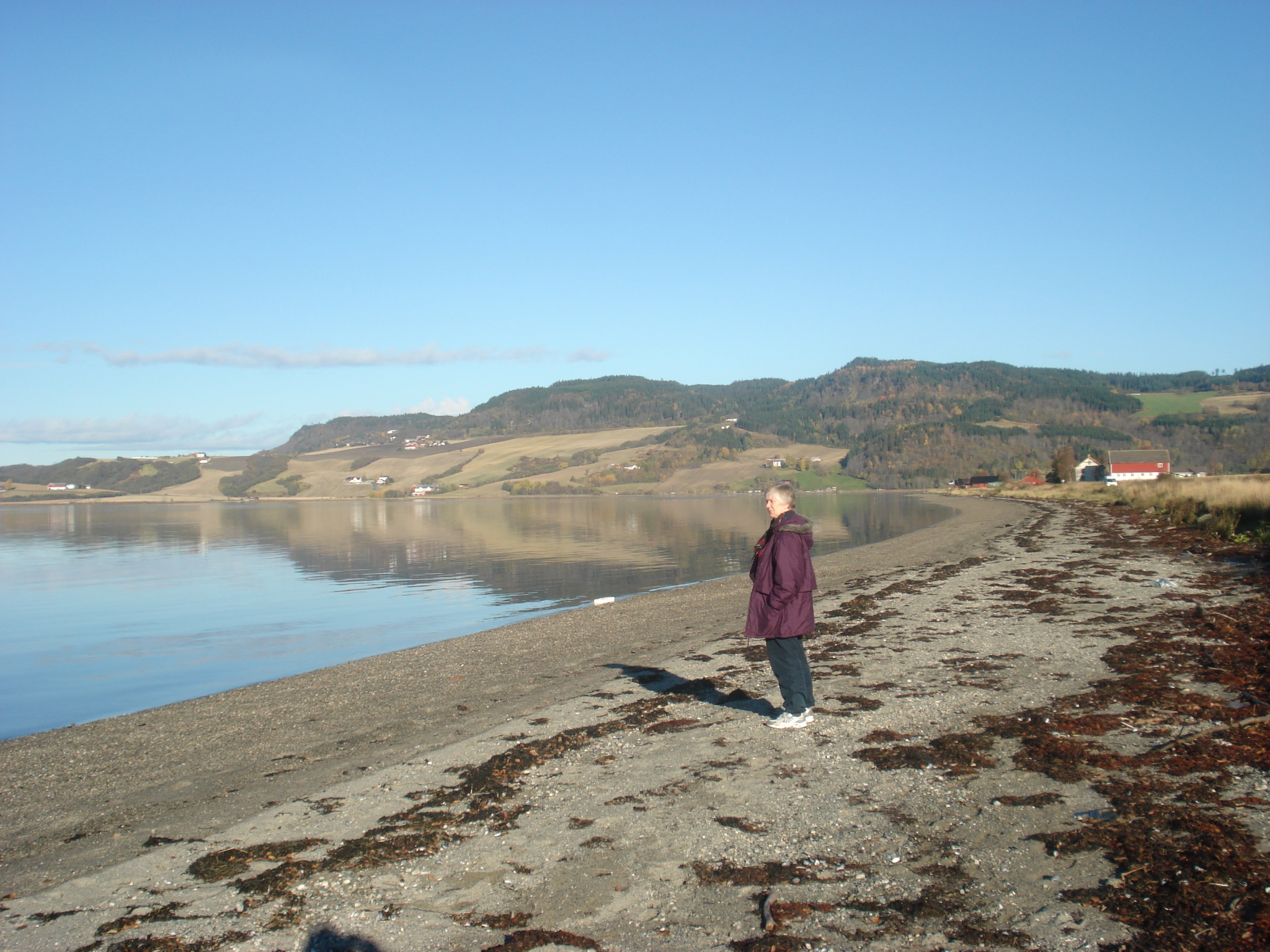 Øysand ved utløpet av Gaula i Melhus